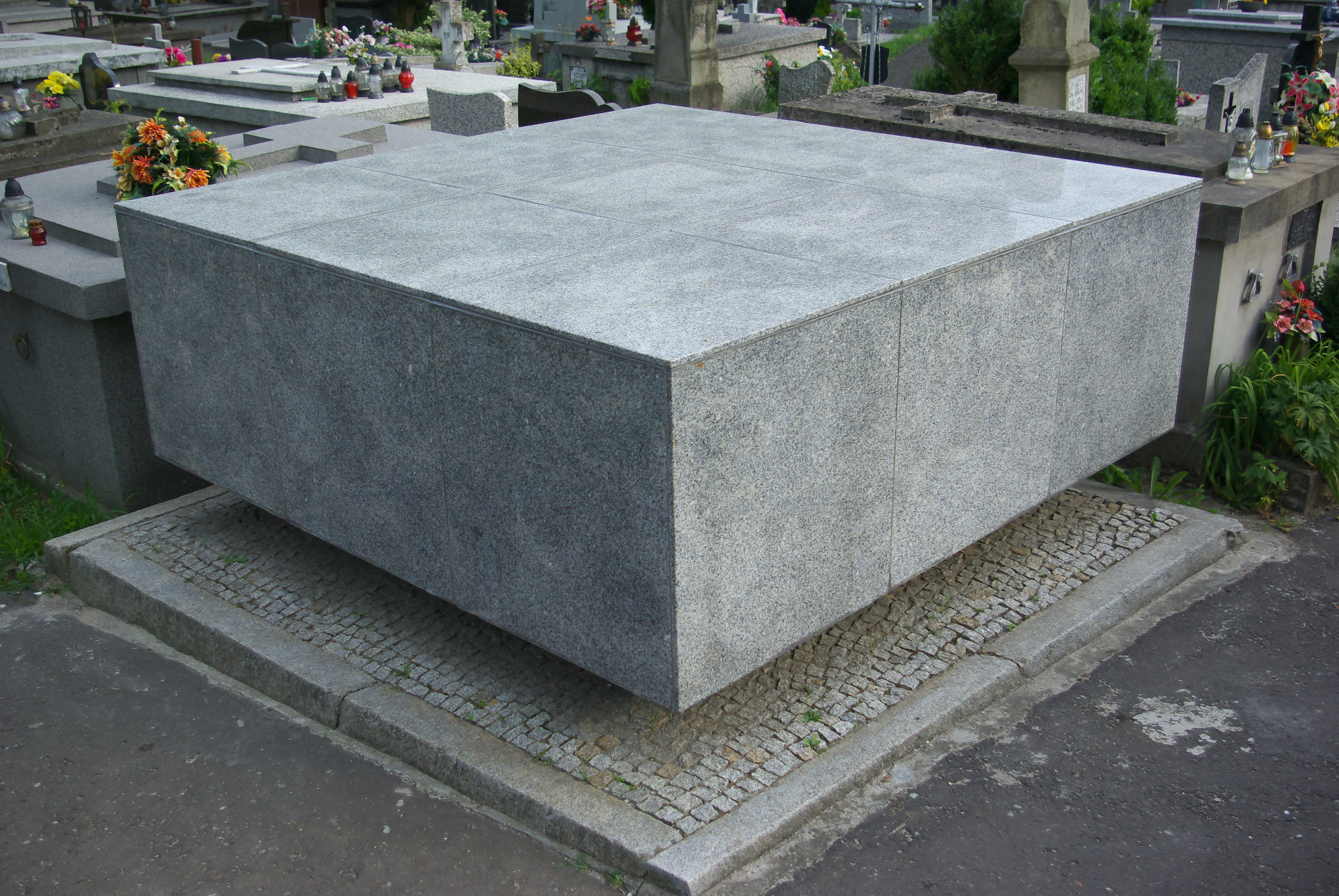 Grobowiec rodziny Baruckich na Cmentarzu Centralnym w Sanoku